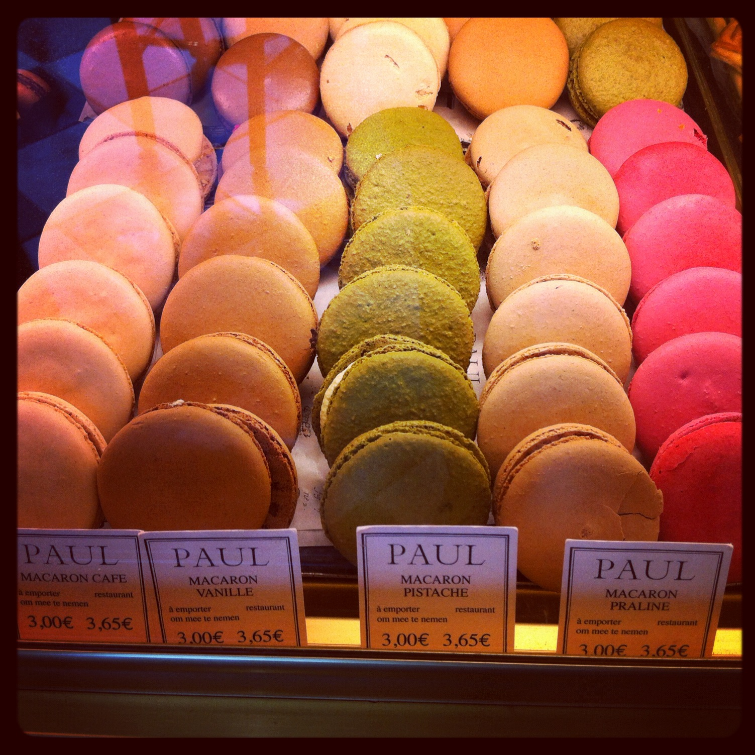 Macaron at paul